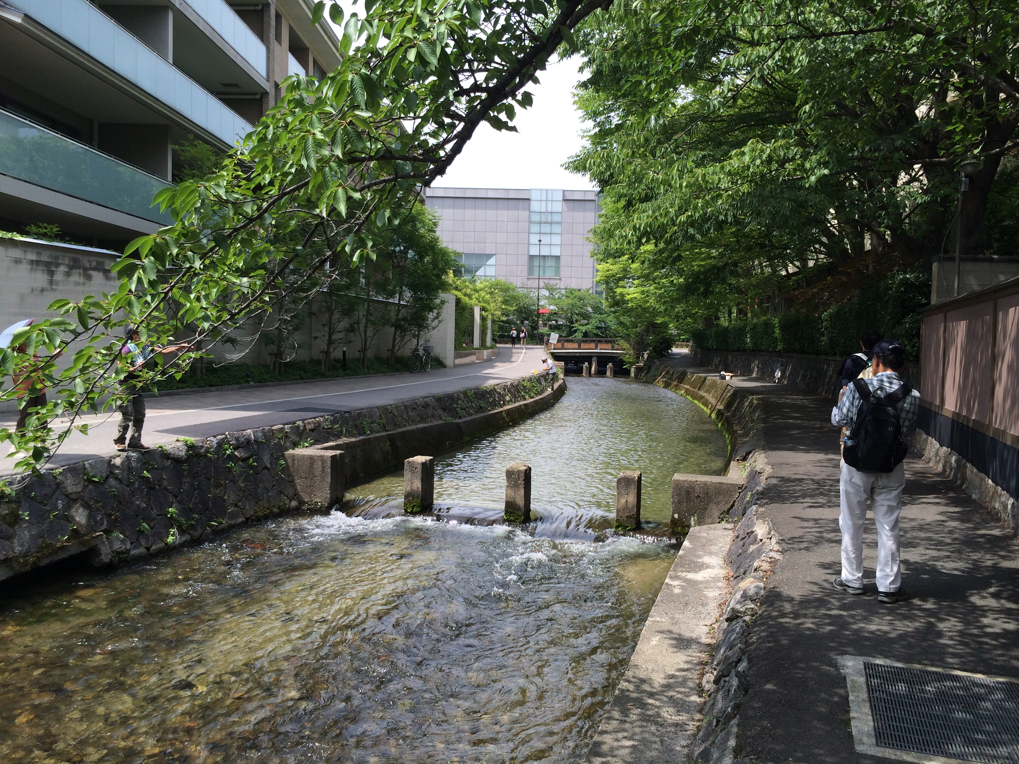 京都の琵琶湖疎水〜白川分水地点に存在する、川をせき止めてプールにするための堰。 昭和33年に設置され、地域の子ども達に親しまれたが、昭和40年代に水質悪化のため使用禁止となった。